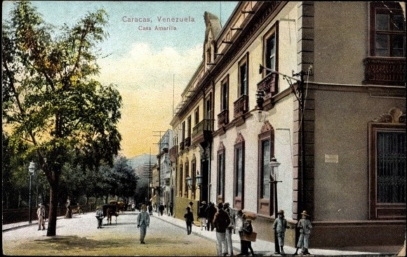 Casa Amarilla, Caracas - Venezuela c.1904